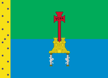 Bandera del Estado de Veracruz de Ignacio de la Llave.